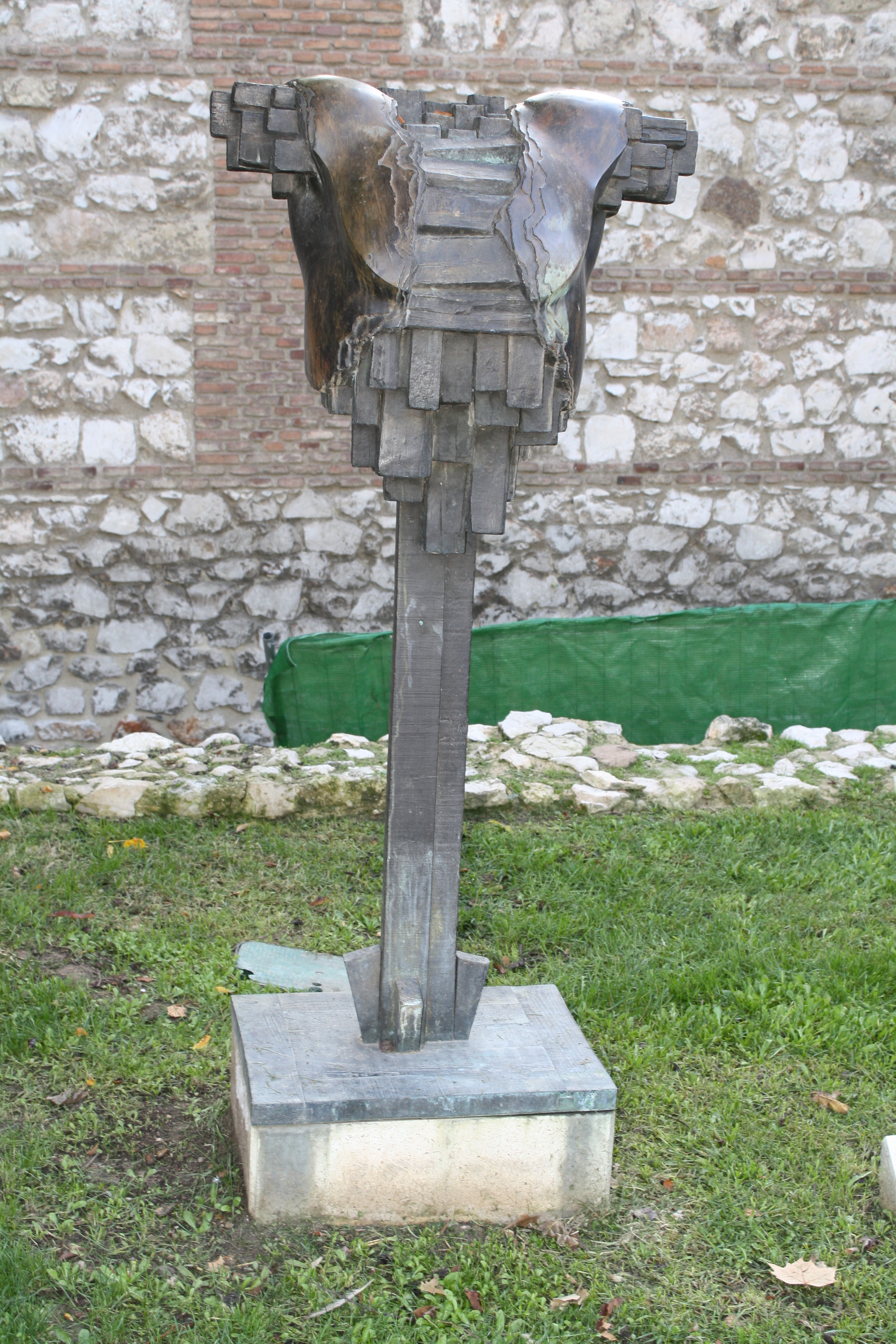 Museo de escultura al aire libre de Alcalá de Henares (Comunidad de Madrid - España). Escultor: Carlos García Muela.